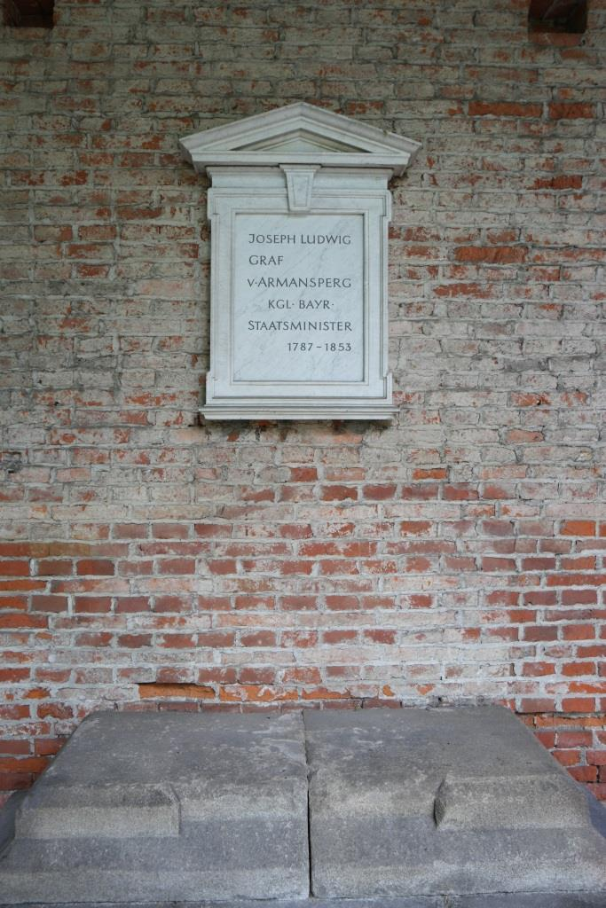 Grab des bayerischen Juristen, Abgeordneten, Ministerialbeamten und Ministers Joseph Ludwig Franz Xavier Graf von Armansperg (1787-1853) auf dem Alten Südlichen Friedhof in München